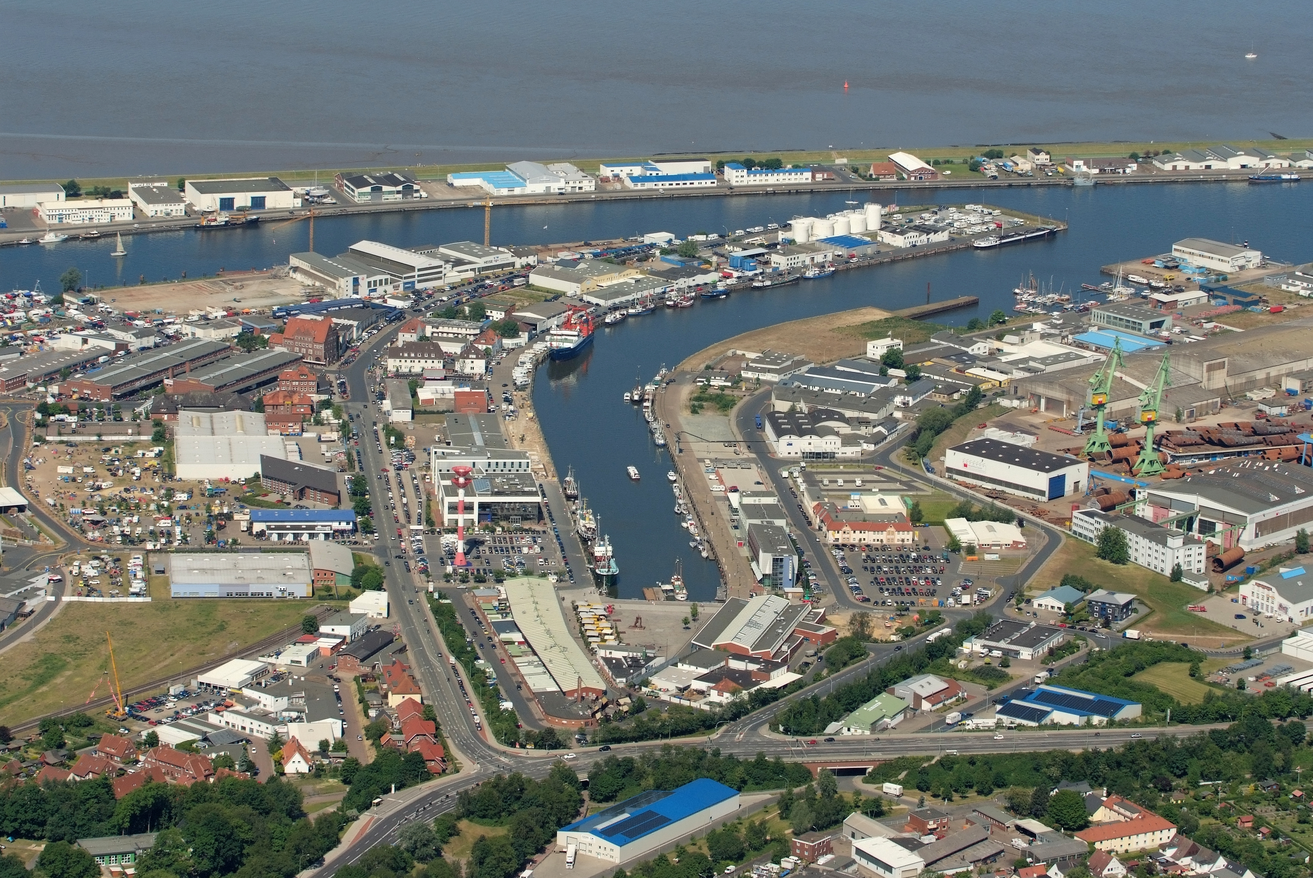 Der Fischereihafen Bremerhaven mit Fischereihafen-Oberfeuer, Blick von Ost, unten das "Schaufenster Fischereihafen" Fotoflug vom Flugplatz Nordholz-Spieka über Cuxhaven und Wilhelmshaven